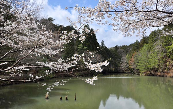 京都 鷹峯 太閤山荘 外苑 紅葉谷庭園 （春の桜）